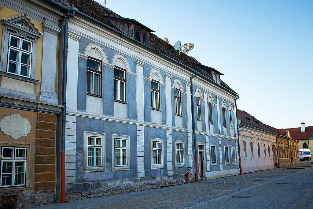 Strada Andrei Șaguna, mitropolit 5, Alba Iulia, interiorul Cetății Alba Carolina